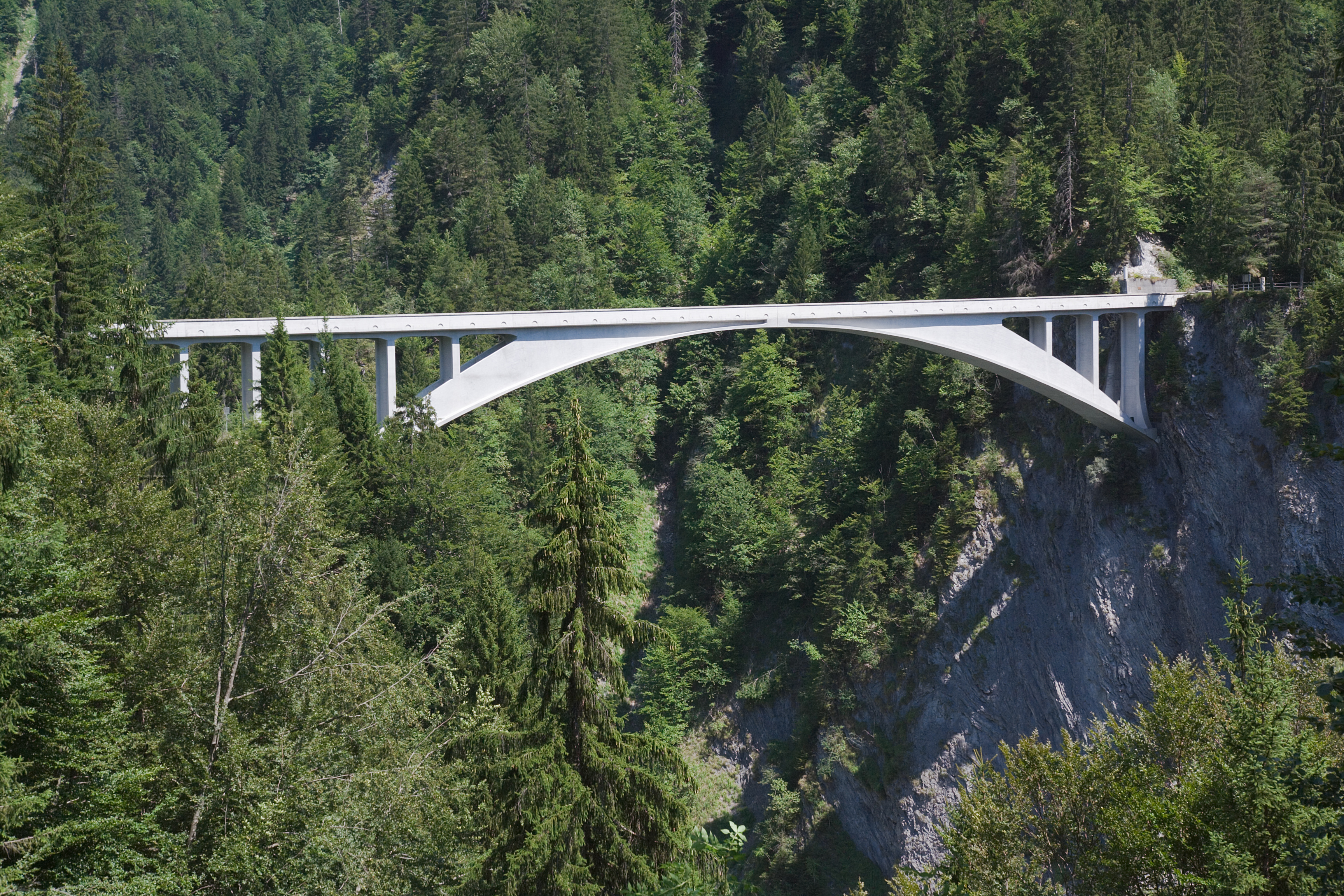 Die Salginatobelbrücke bei Schiers im Querformat, SchweizAnsicht von Südwesten